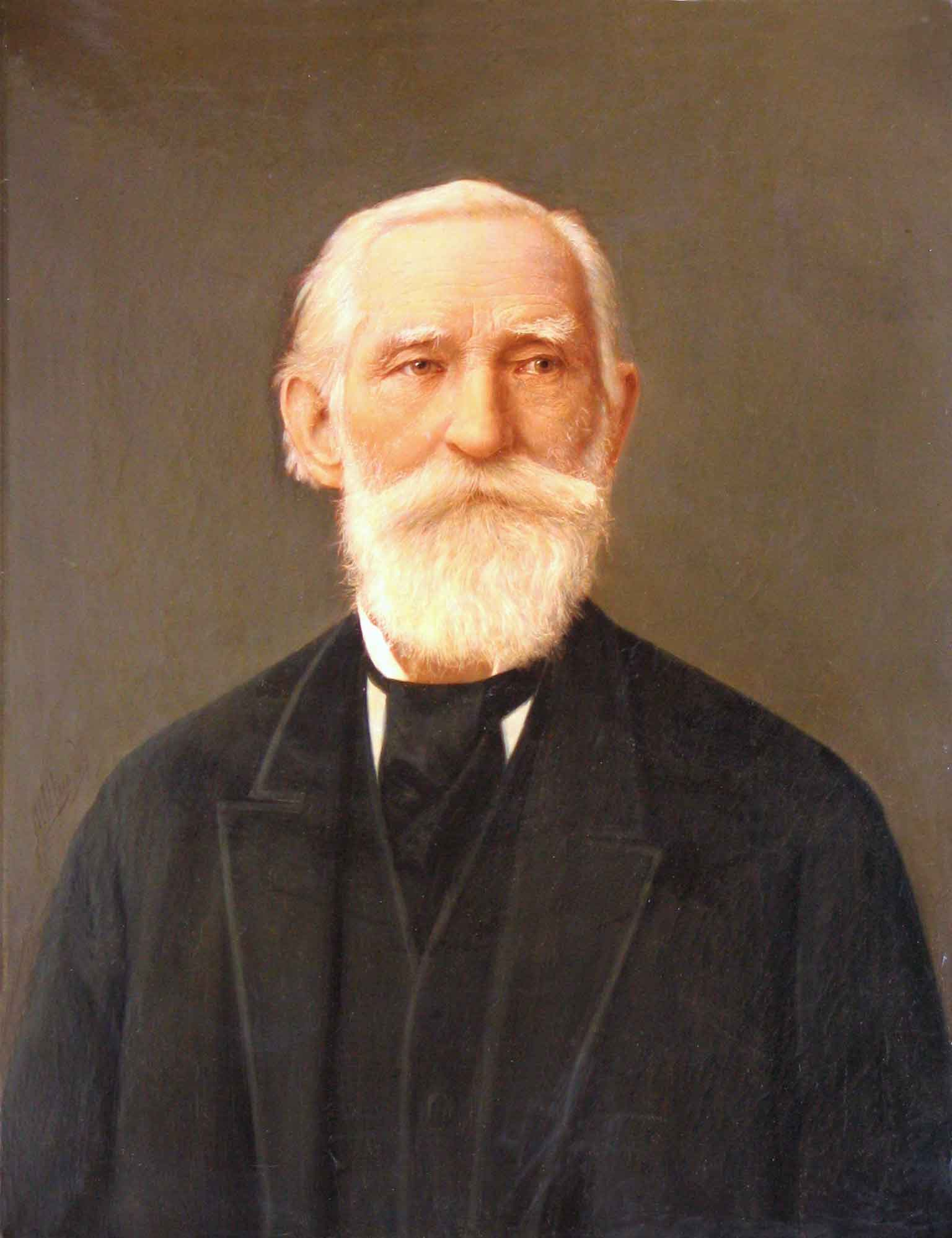 Русский математик и механик, основоположник петербургской математической школы, академик Петербургской академии наук Пафнутий Львович Чебышёв (1821—1894). Репродукция с портрета, хранящегося в Музее истории (первоначально — в Механическом кабинете) Санкт-Петербургского университета